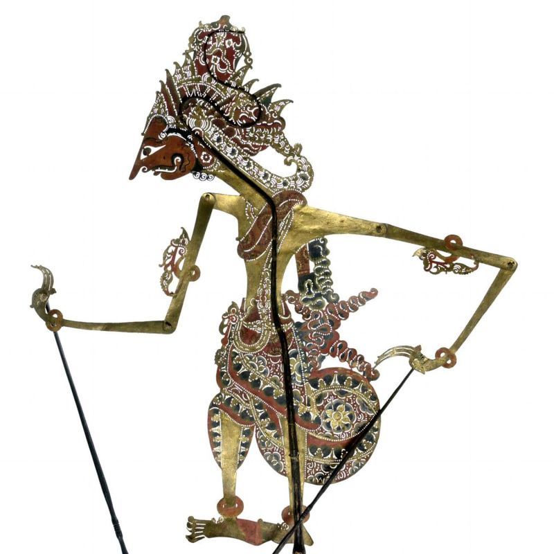 Schaduwfiguur. Wajangpop voorstellende Kuntiboja Unknown language: Wayang kulit purwa